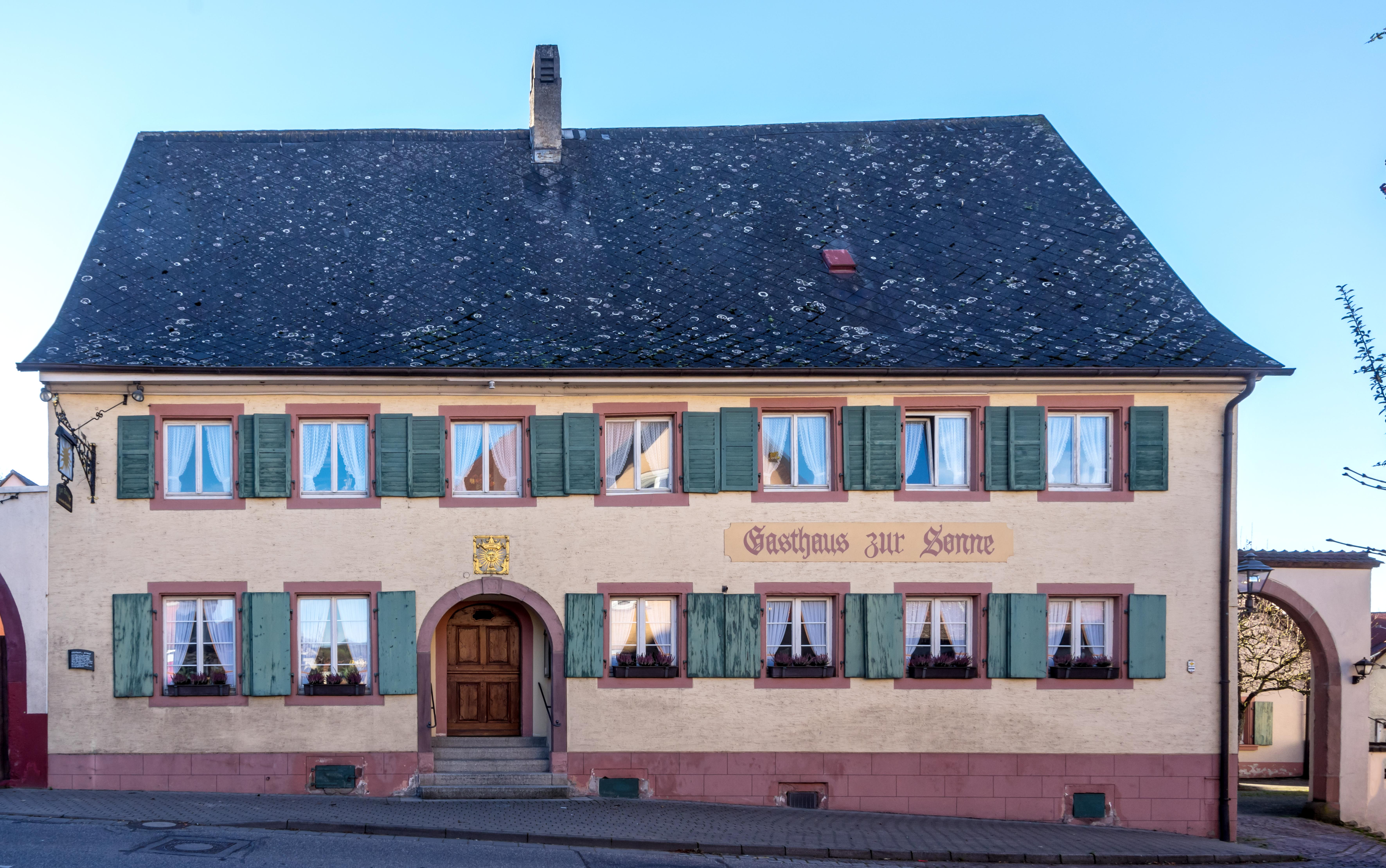 Bilder aus Merdingen am Tuniberg Gasthaus zur Sonne